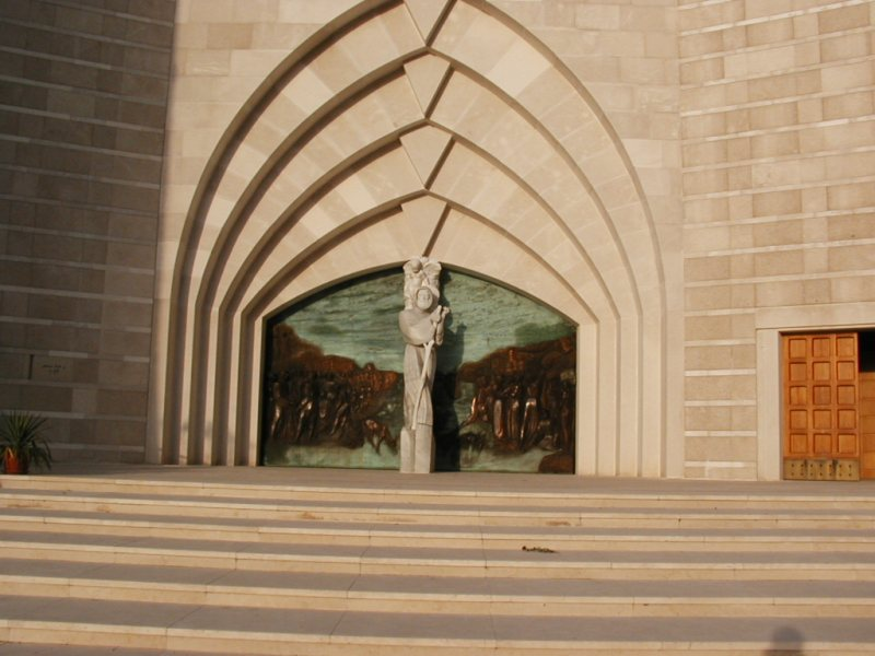 Paola porta Chiesa nuova (Foto di Luigino C.)